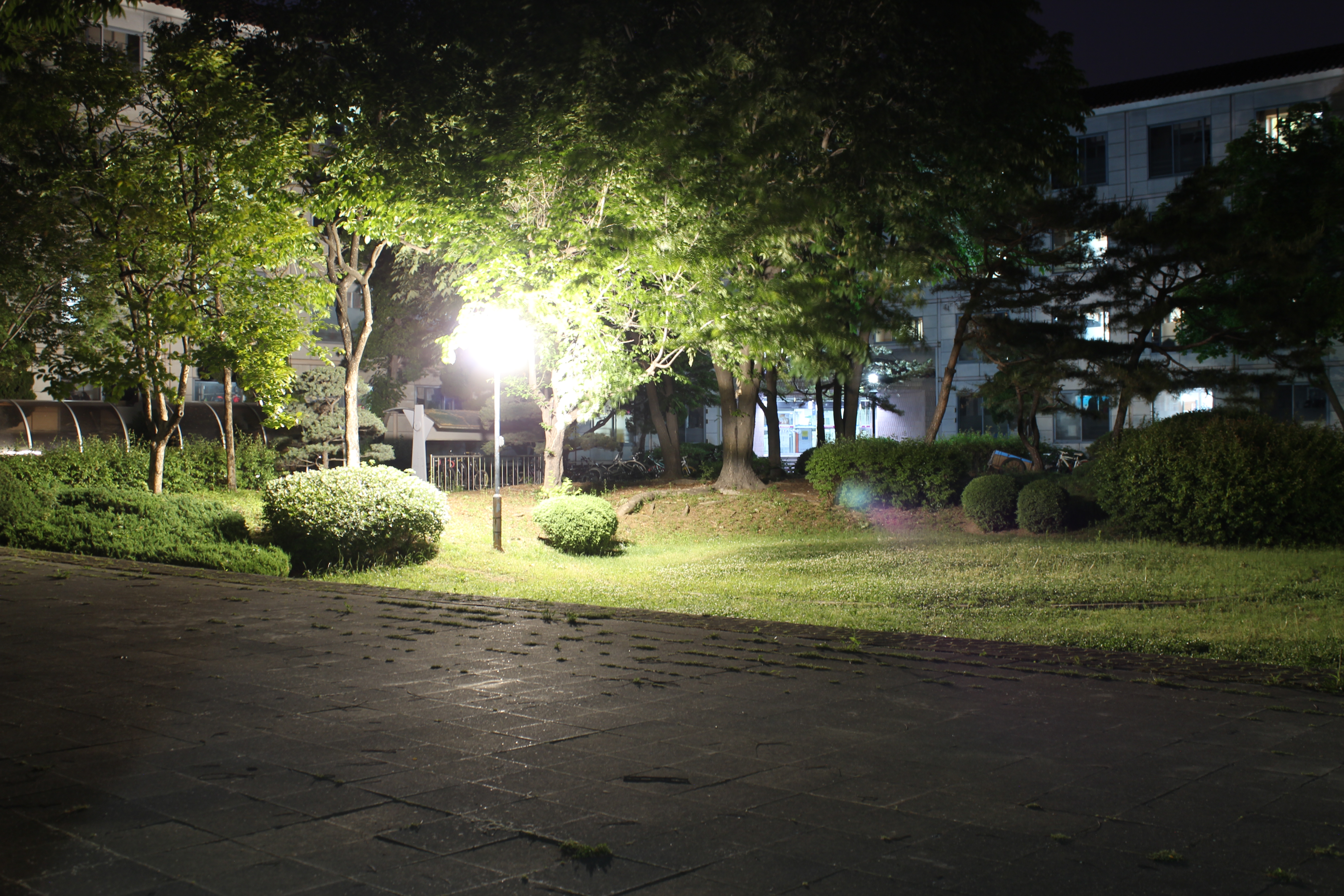 한국체육대학교 내에 존재하는 공원의 야경.